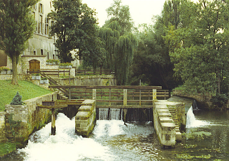 self made